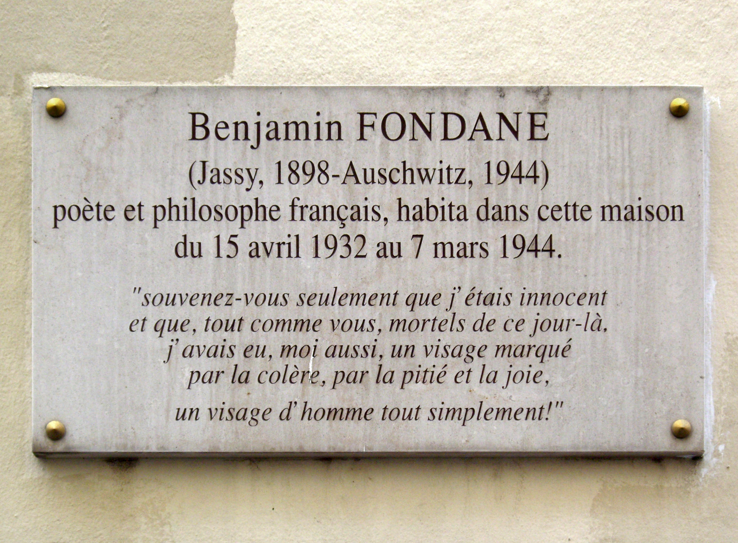 Plaque apposée au n° 6 de la rue Rollin, Paris 5e.Benjamin Fondane (Jassy, 1898 - Auschwitz, 1944), poète et philosophe français, habita cette maison du 15 avril 1932 au 7 mars 1944.« Souvenez-vous seulement que j'étais innocent et que, tout comme vous, mortels de ce jour-là, j'avais eu, moi aussi, un visage marqué par la colère, par la pitié et la joie, un visage d'homme tout simplement. »